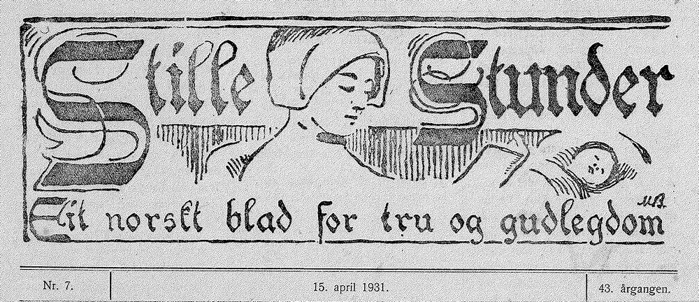 Forside til Stille stunder